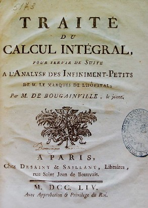 "Traité du calcul intégral" (Vol. 1, 1754) by Louis Antoine de Bougainville (1729-1811)